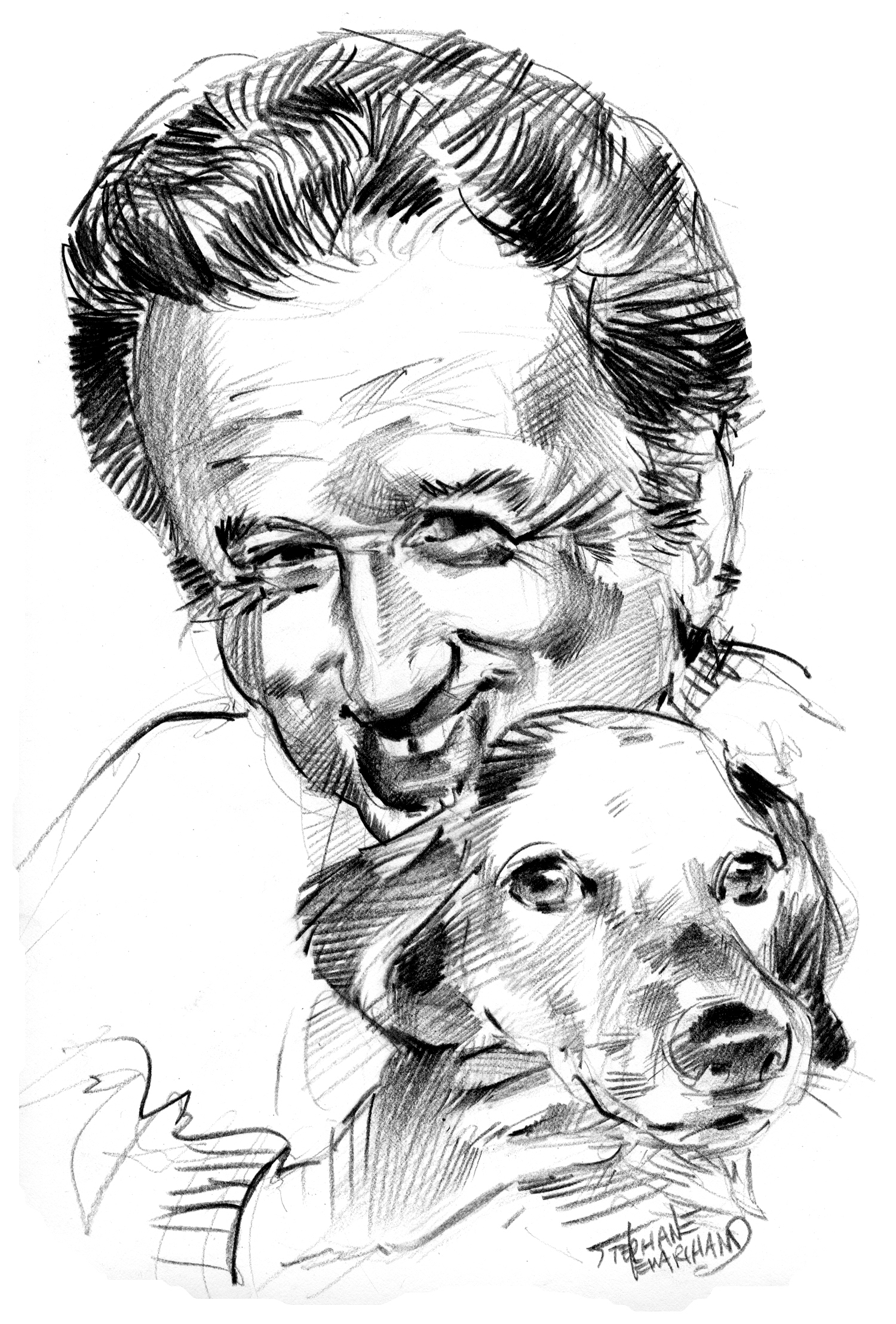 Dessin au crayon noir sur papier dessin